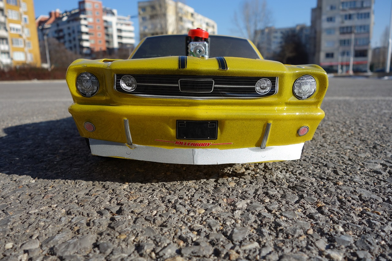 Coches Radiocontrol con motores de Gasolina